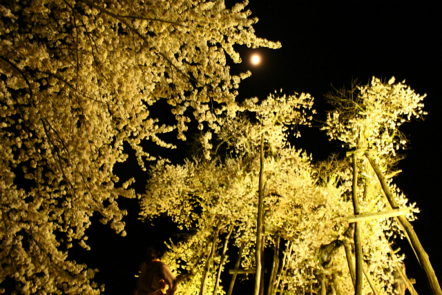 伊佐沢の久保桜ライトアップ